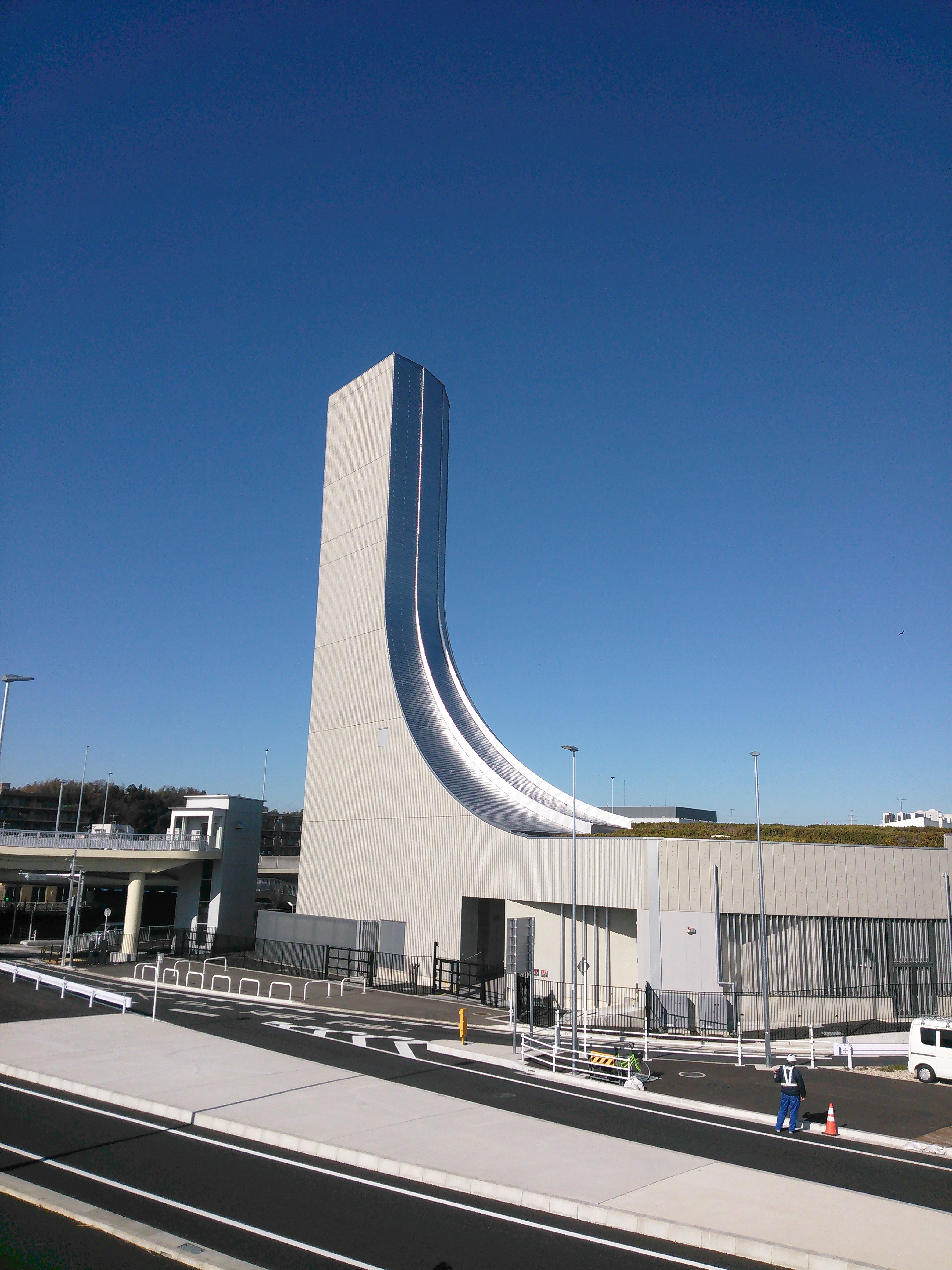 横浜市港北区、首都高速横浜北線横浜北トンネル新横浜換気所